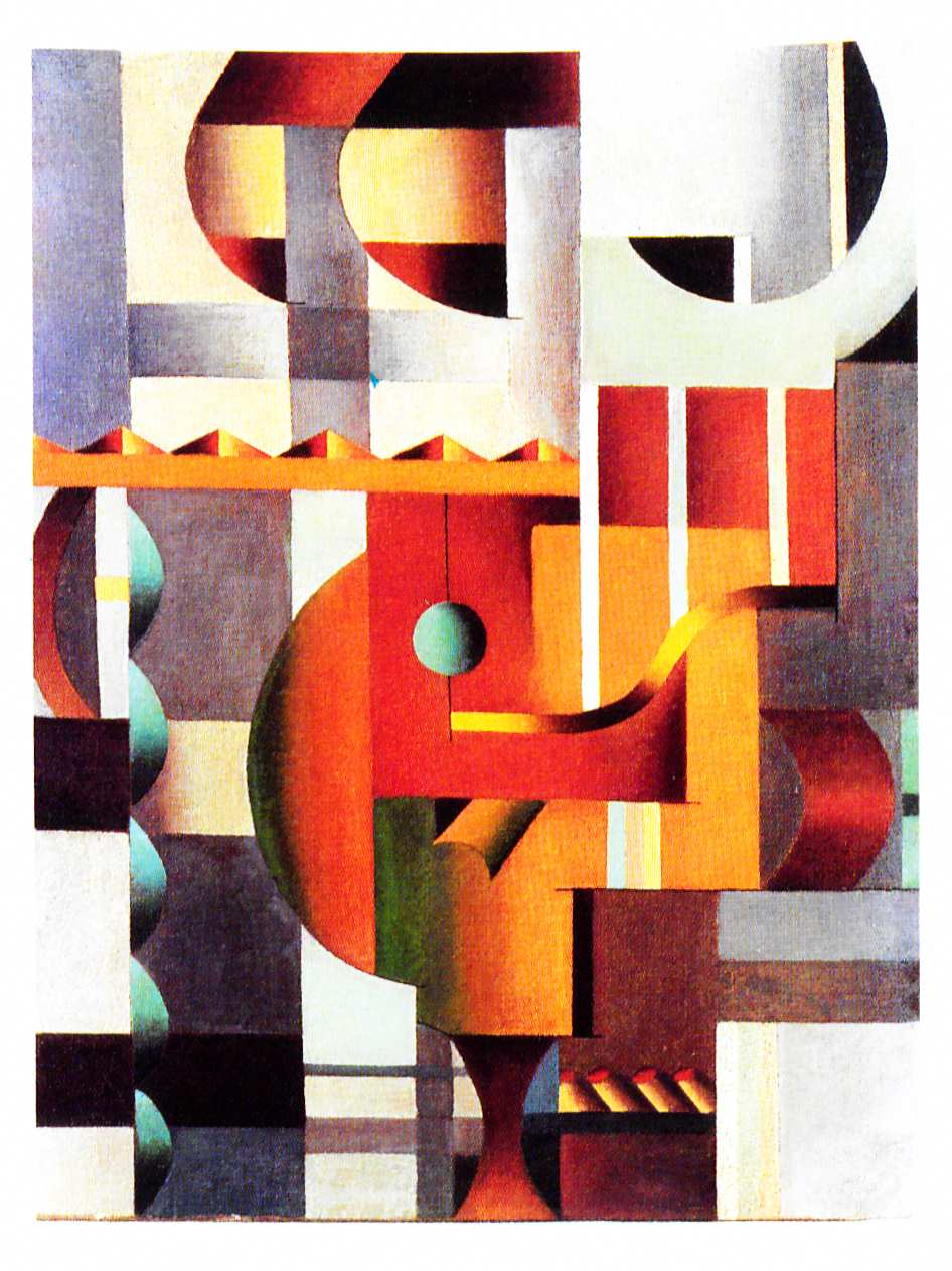 Nina Kogan Komposition 1920